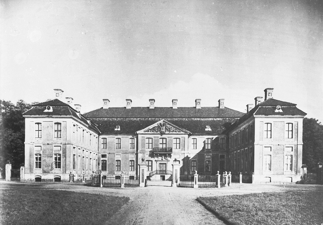 Finckenstein, Schloß, erbaut 1716-1720, Ansicht von W, (Aufn. 1. Drittel 20. Jahrh., Preußische Meßbildanstalt Berlin)